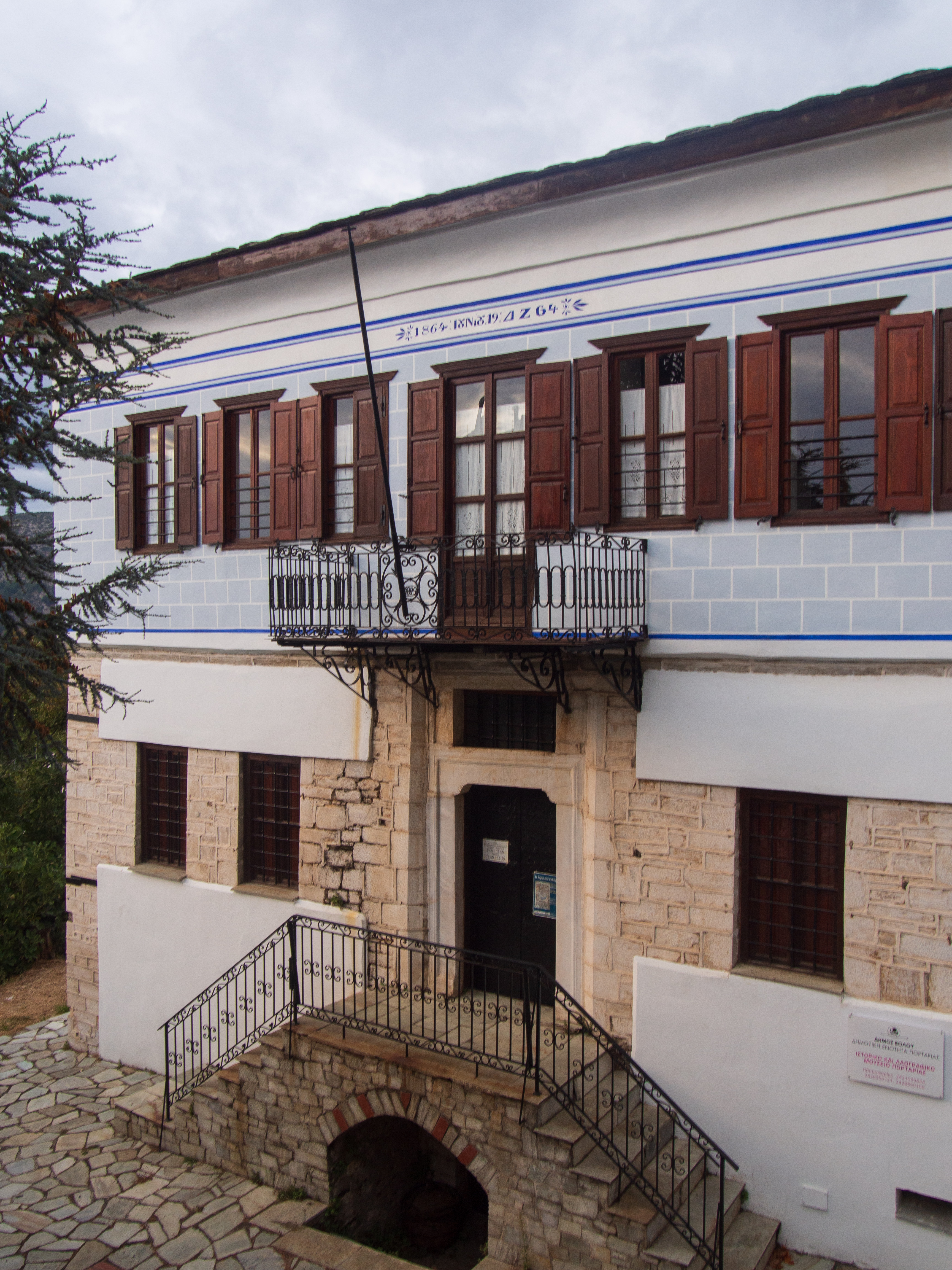 Αρχοντικό Ζούλια, Πορταριά«Αρχοντικό Ζούλια, Πορταριά»